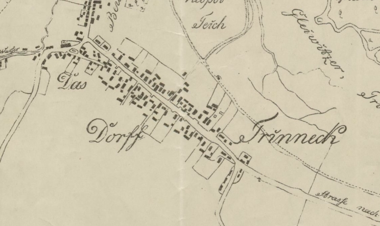 Trinneck bei Gleiwitz im Jahr 1812. Zeichnung von 1911 nach alten Karten.